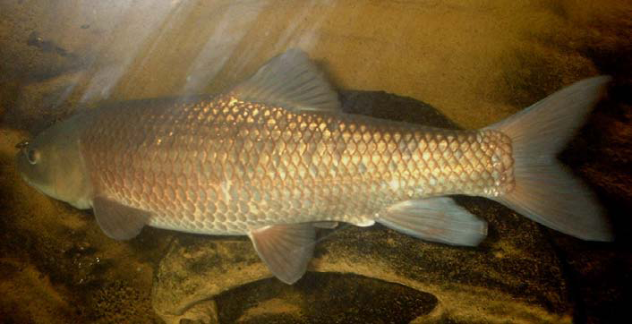 B.Callensis à l'aquarium Public de Dar El hout